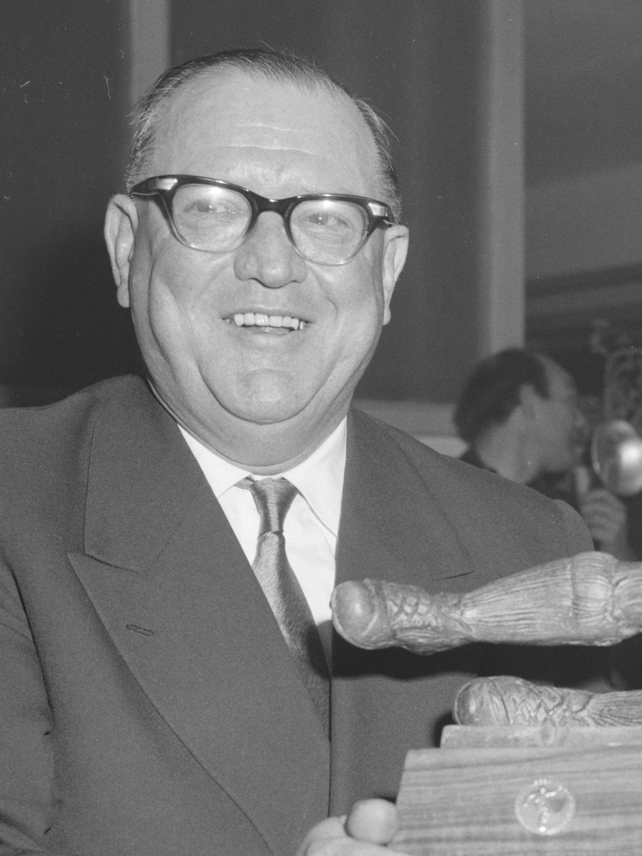 Gustav Widerkehr (1905-72), President of the Swiss Football Association (1954-64) and UEFA (1962-72) Collectie / Archief : Fotocollectie Anefo Reportage / Serie : [ onbekend ] Datum : 26 april 1962 Fotograaf : Bilsen, Joop van / Anefo Auteursrechthebbende : Nationaal Archief Materiaalsoort : Negatief (zwart/wit) Nummer archiefinventaris : bekijk toegang 2.24.01.04 Bestanddeelnummer : 913-8132